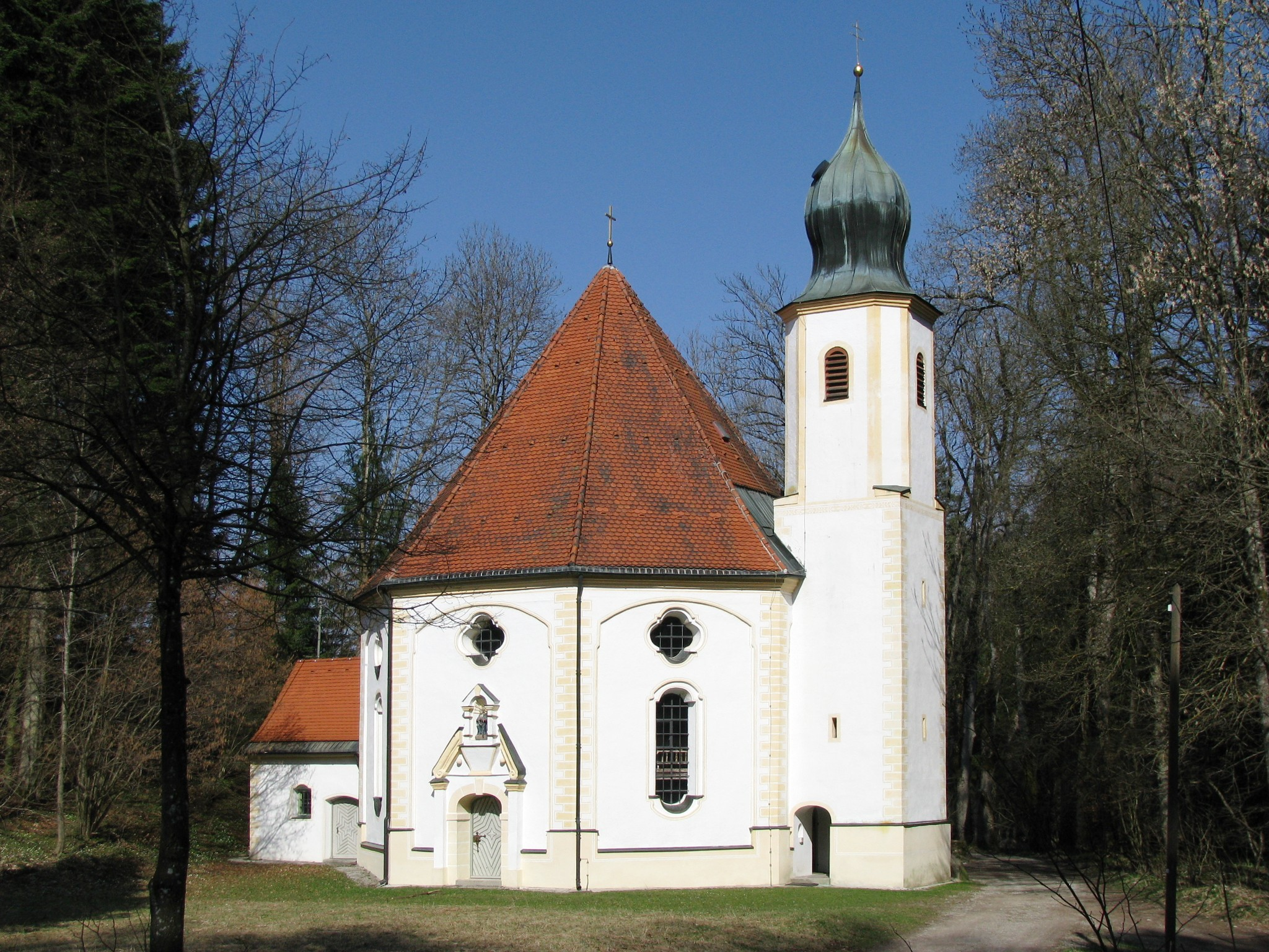 Wallfahrtskirche Maria Elend bei Dietramszell; Ansicht von Süden